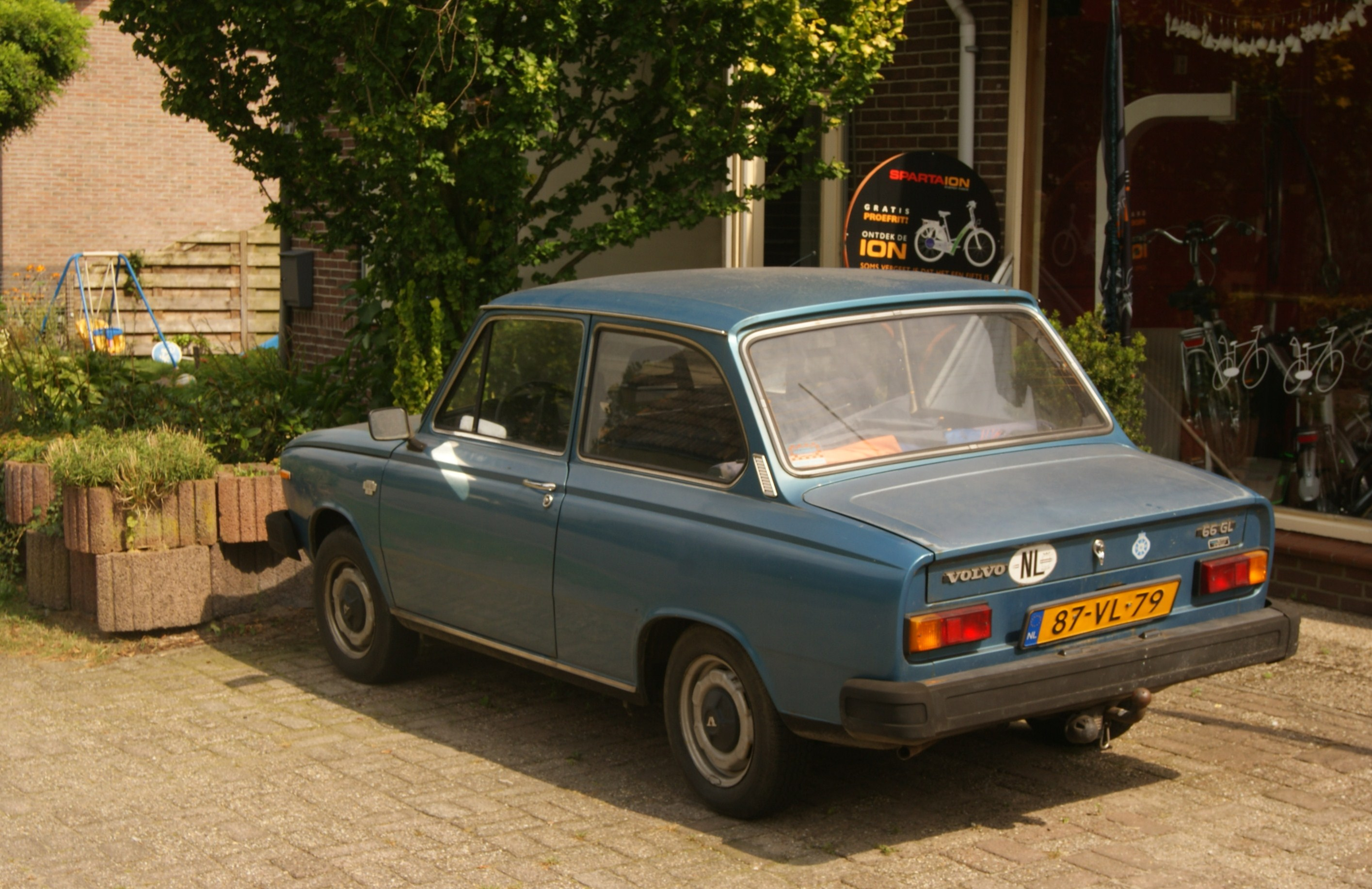 87-VL-79